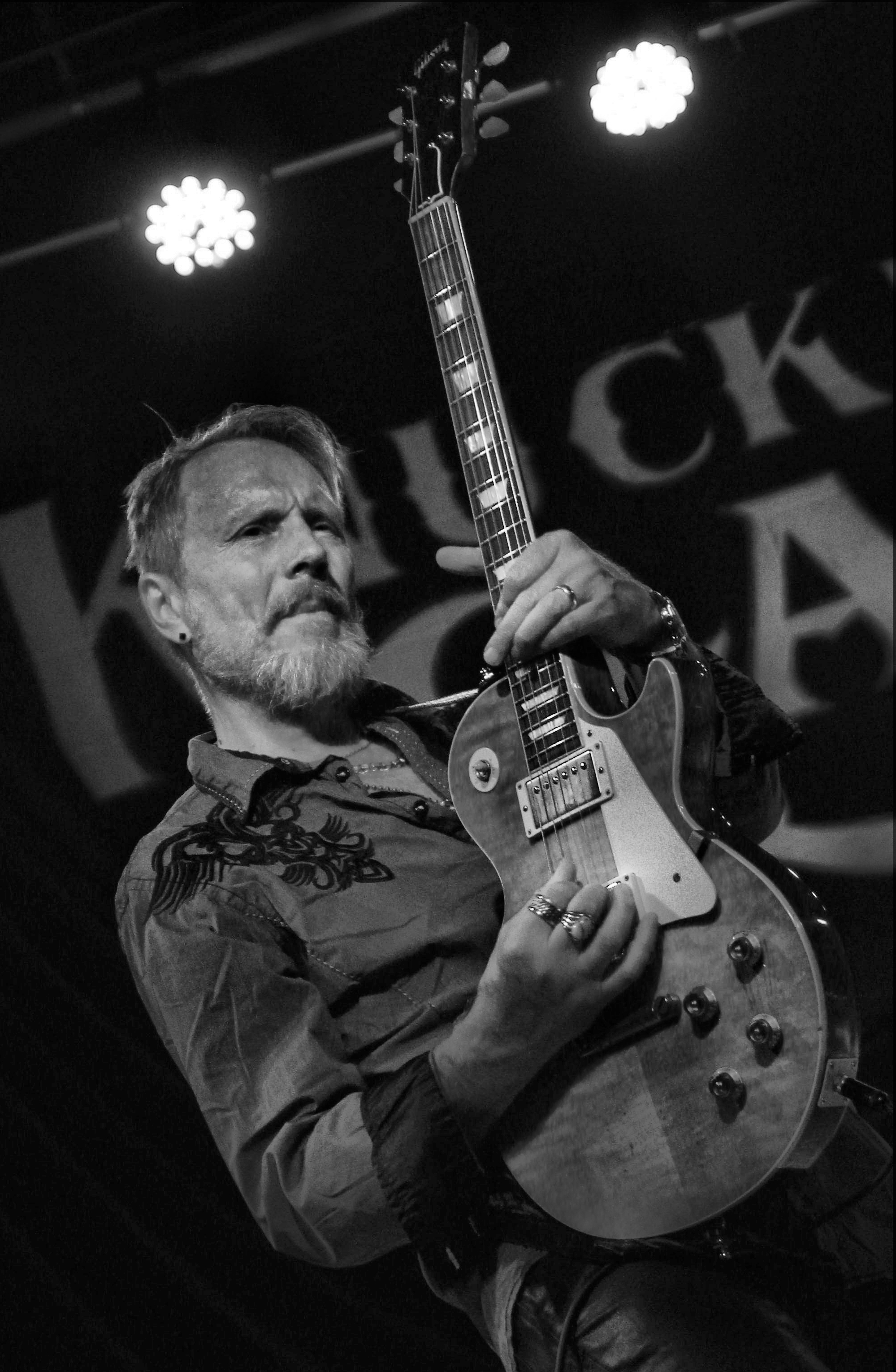 Jyrki Manninen in Kansas City mit Wishbone Ash 2016- von Steven Koontz